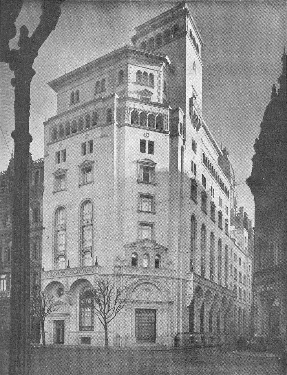 Frente del edificio del Nuevo Banco Italiano frente a la Plaza de Mayo, en el barrio de San Nicolás, ciudad de Buenos Aires Argentina. Hoy es una sucursal del BBVA Banco Francés.